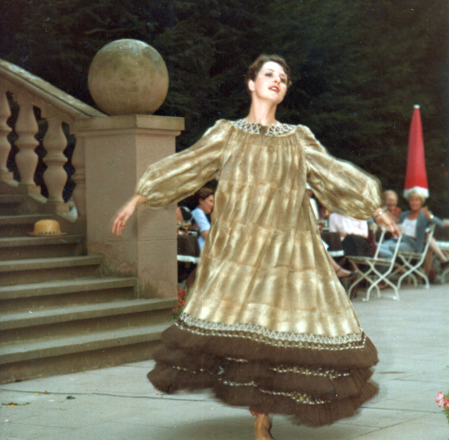 Fritz Schwörer Pelze, Emmendingen, Lammstraße 4. Modenschau im Schlosspark zu Rust (Europa Park), 16. Mai 1981, 15.30 Uhr.